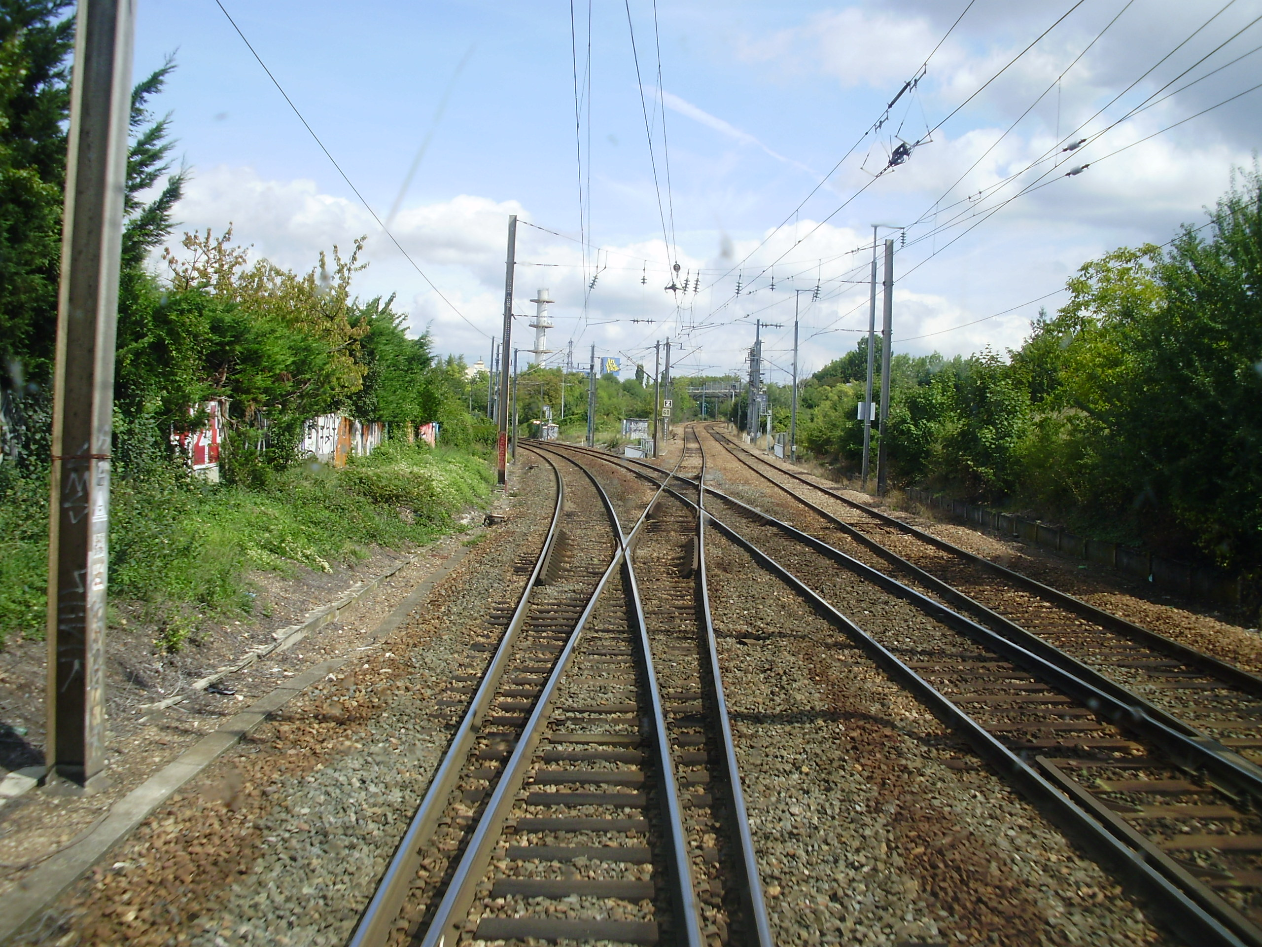 Bifurcation sur le territoire de la commune d'Éragny, Val-d'Oise, France, à un kilomètre environ au nord de la gare d'Éragny - Neuville entre, à gauche, la ligne d'Achères à Pontoise et, en face, un raccordement qui permet de rejoindre la ligne de Saint-Denis à Dieppe, vue depuis la cabine de conduite d'une rame se dirigeant vers Pontoise